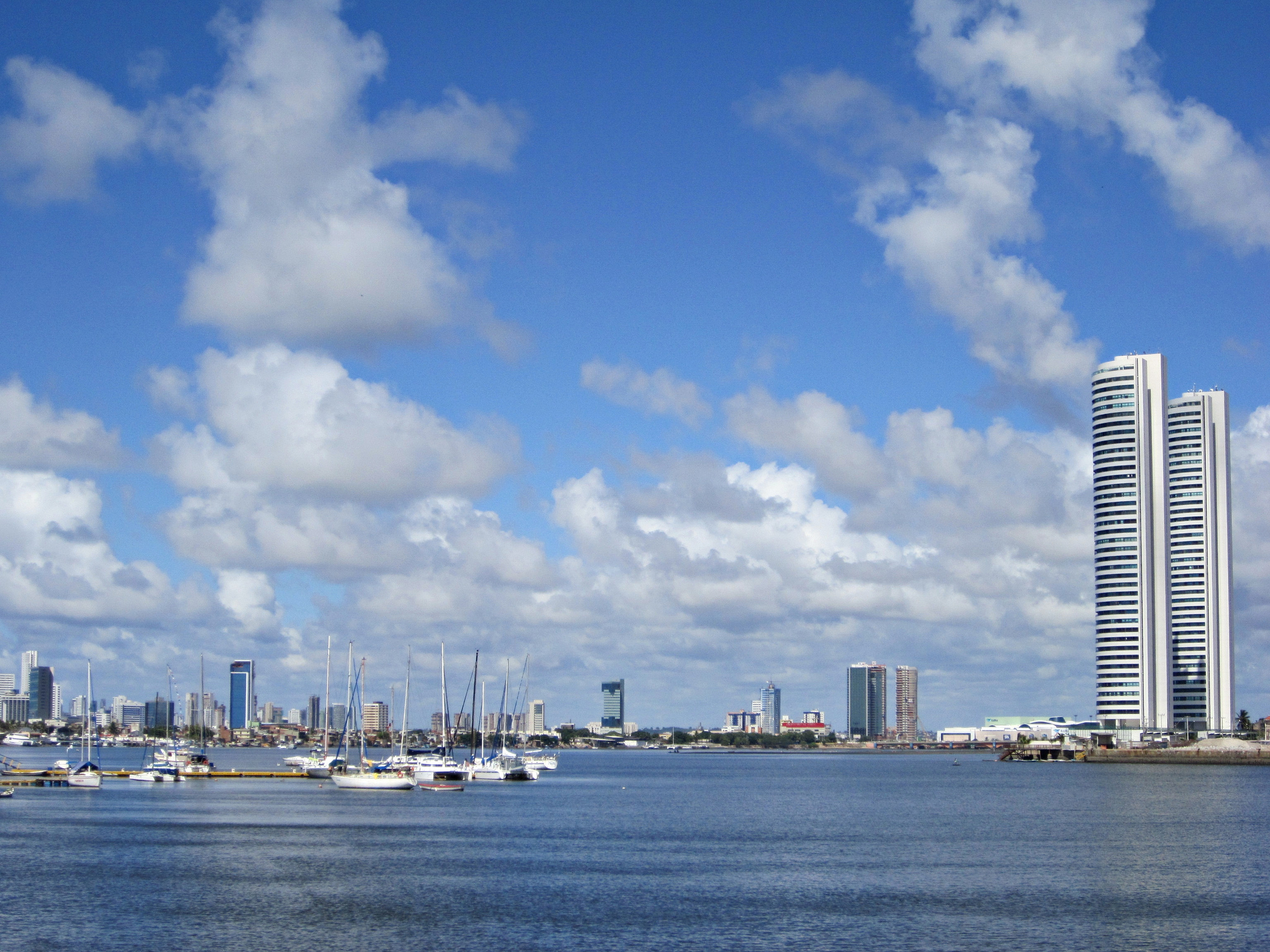 Bacia do Pina com os edifícios Píer Maurício de Nassau e Píer Duarte Coelho à esquerda - Recife, Pernambuco, Brasil